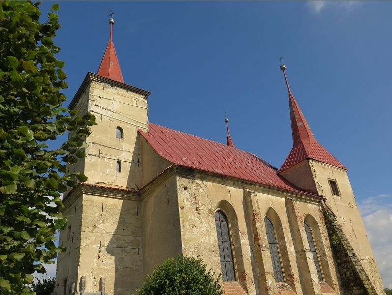 Kostel svatého Václava, západní okraj vsi, Sýčina.